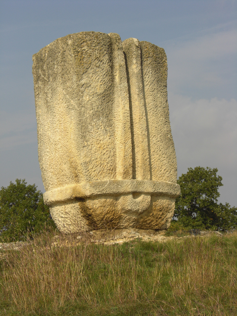 Skulptur von Herbert Baumann, 1964, Symposion Europäischer Bildhauer, St.Margarethen, Burgenland, Austria mehr info auf